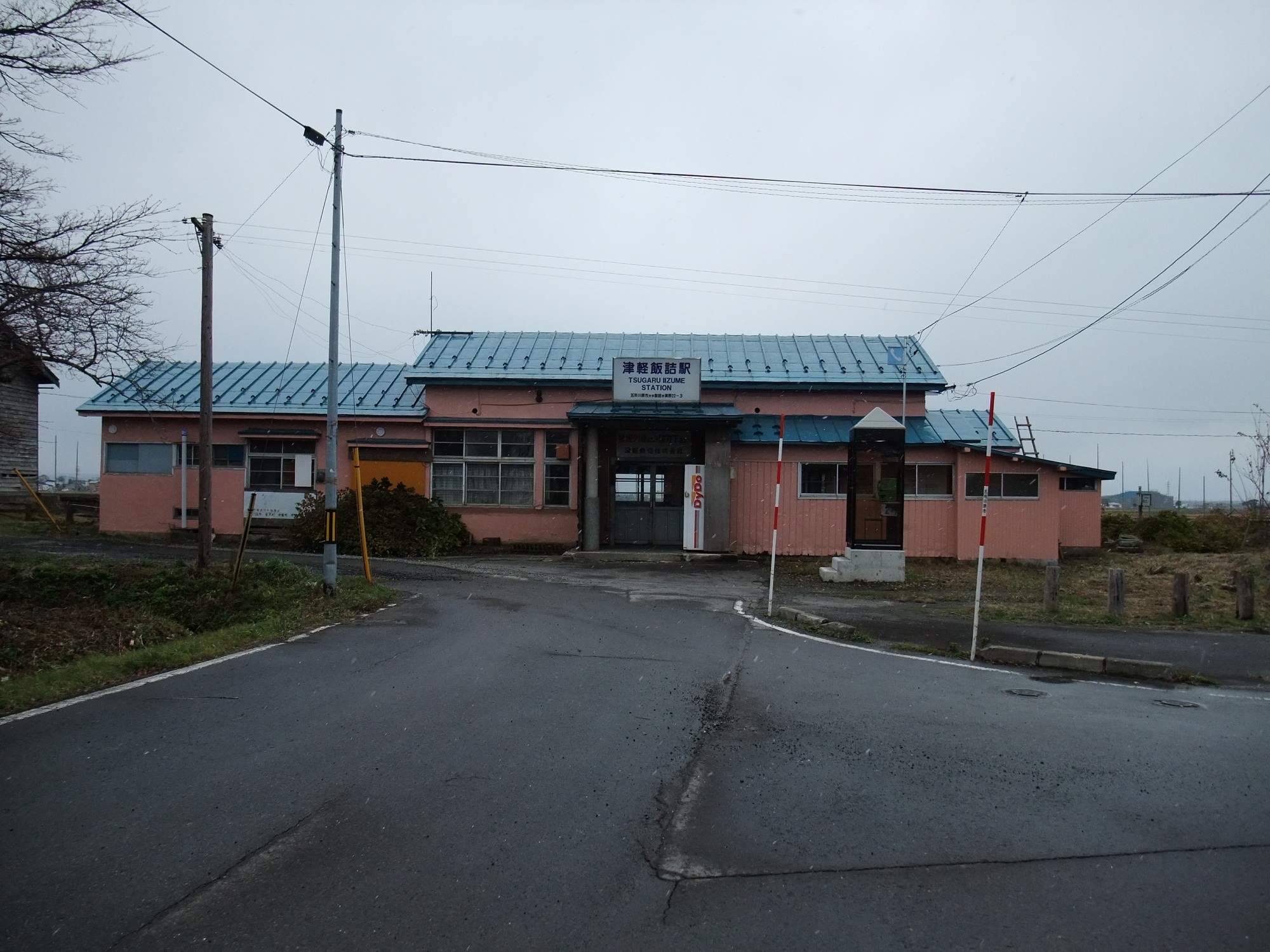 津軽鉄道 津軽飯詰駅